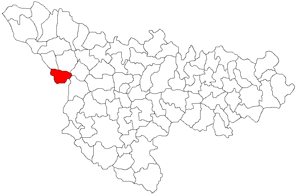 Jimbolia, judetul Timis Licensing Categorie:Hărţi ale judeţului Timiş